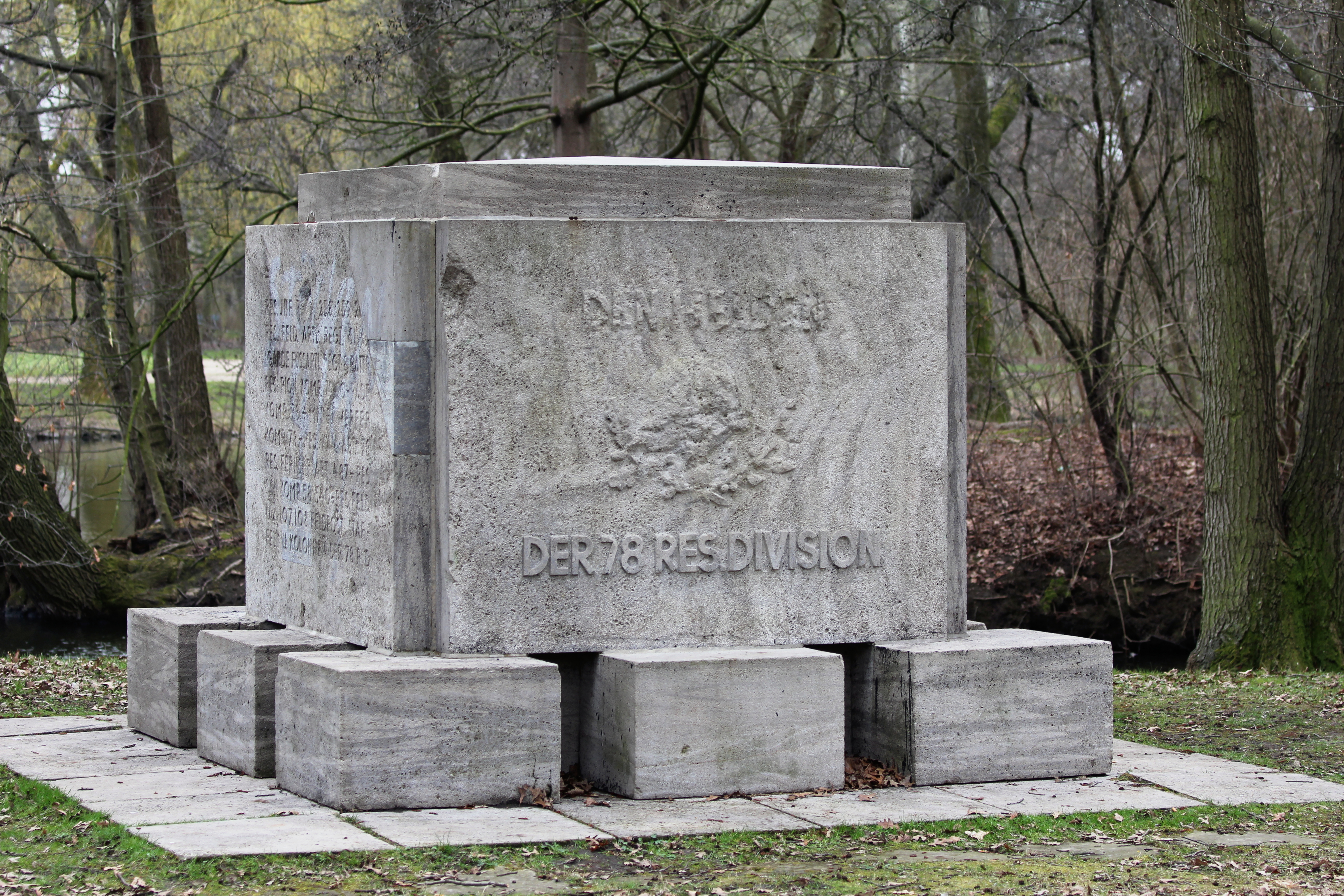 Kriegerdenkmal im Georgengarten in Hannover für die Gefallenen der 78. Reserve-Division Inschrift auf der Vorderseite: DEN HELDEN DER 78. RES.DIVISION Inschrift auf der Rückseite: IHR LEBT Inschrift auf der rechten Seite (sowie es noch erkennbar ist): 1915 WINTERSCHLACHT IN MASUREN WIR BALLEN KÄMPFE UM SCHAULEN U. AN DER DUBISSA – VORMARSCH U. KÄMPFE IN KURLAND-STURM AUF SCHLOSSBERG 1916 KÄMPFE VOR DÜNABURG ILLUXT ABSCHNITTE HANNOVER HILDESHEIM OLDENBURG U. KÖLN – 1917 CHEMIN DES DAMES VAUXAILLON PINON VERDUN ORNESSCHLUCHT VAUXKREUZ – 1918 DOP PELSCHLACHT AISNE-CHAMPAGNE VOR MARSCH ZUR MARNE – KÄMPFE ZWISCHEN AISNE U. MARNE AM OURCO U. DER VESLE Inschrift auf der linken Seite (sowie es noch erkennbar ist; die ersten beiden Zeilen sind am Ende abgeschnitten, da bei der Vierung in dem Bereich die Schrift nicht ergänzt wurde): RES.INF.RT 258 259 260 RES. FELD. ARTL. REGT. 61 62 1.GARDE FUSSARTL.REGT.8 BATTR. RES.PION.KOMP 7. O-RADF. KOMP.78 – MINENWERFER KOMP.78 – RES-KAV.ABT.78 RES.FERNSPR.ABT. 4 87 – RES. SAN.KOMP 58 540 – RES.FELD. LAZ 107.108 FELDPOST STAF FELN U. KOLONEN DER 78 R.D. Die Festschrift zu Weihe des Kriegerdenkmals gibt an:[1] Material: fränkischer Muschelkalk Bildhauerarbeiten an der Vorderseite: Scheuernstuhl Hannover Entwurf und Bauleitung: Dr. Ing. Winkelmüller Ausführung: Fr. Meine